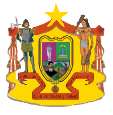 Escudo del municipio Rafael Rangel. Estado Trujillo. Venezuela